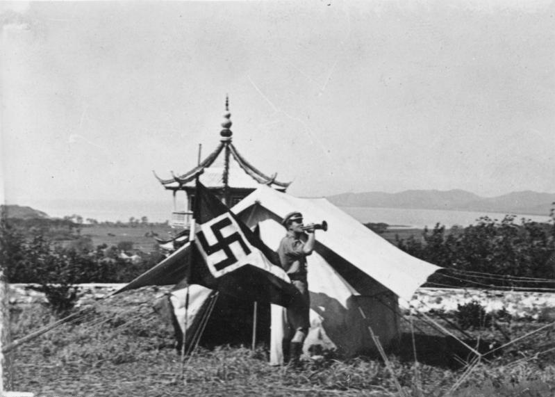 HJ in China, Lager Ostern HJ in China, Lager Ostern 1935, der Trompeter weckt das Lager [Foto erworben durch Reichsjugendführung]